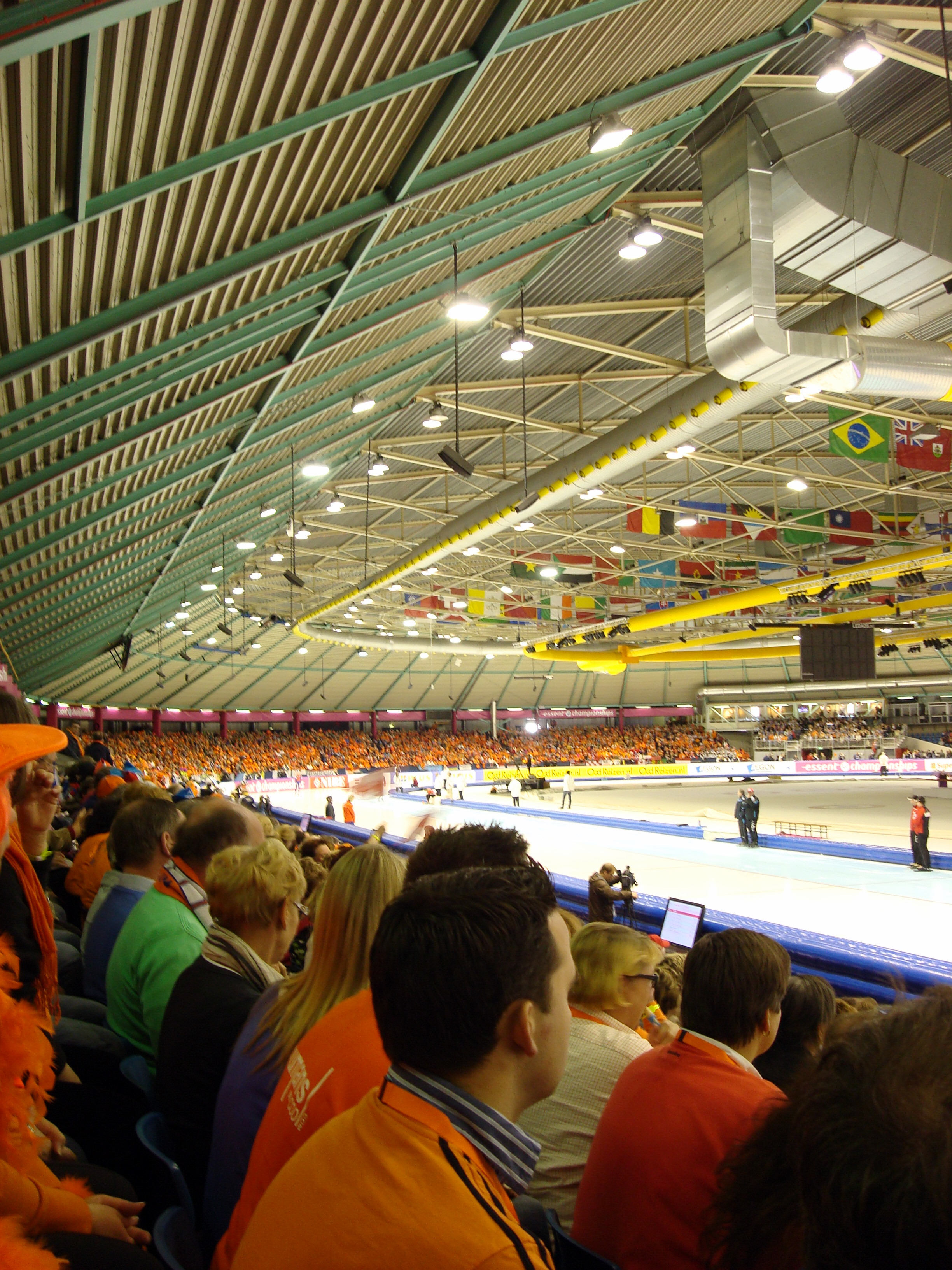 WK Schaatsen in Heerenveen (Thialf). Jaar: 2010